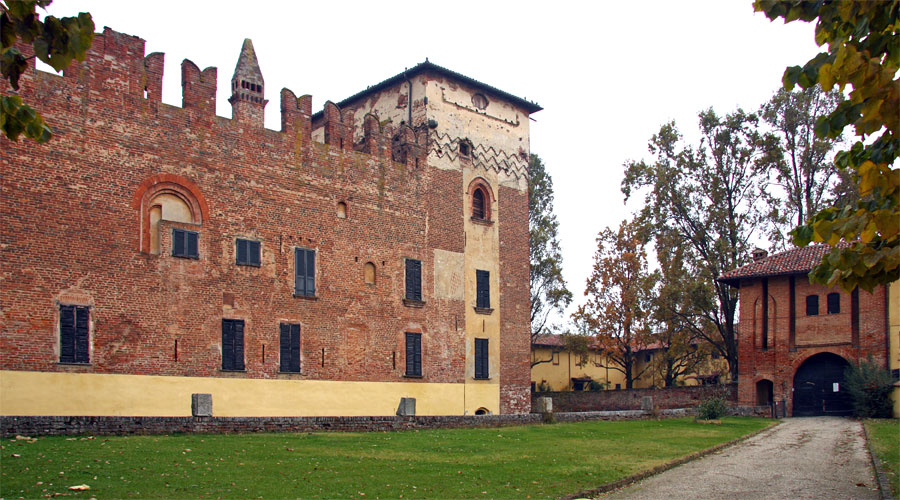 Veduta del castello di Cozzo (PV)